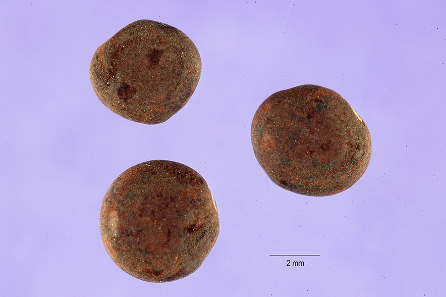 Vicia pannonica Crantz - Hungarian vetch